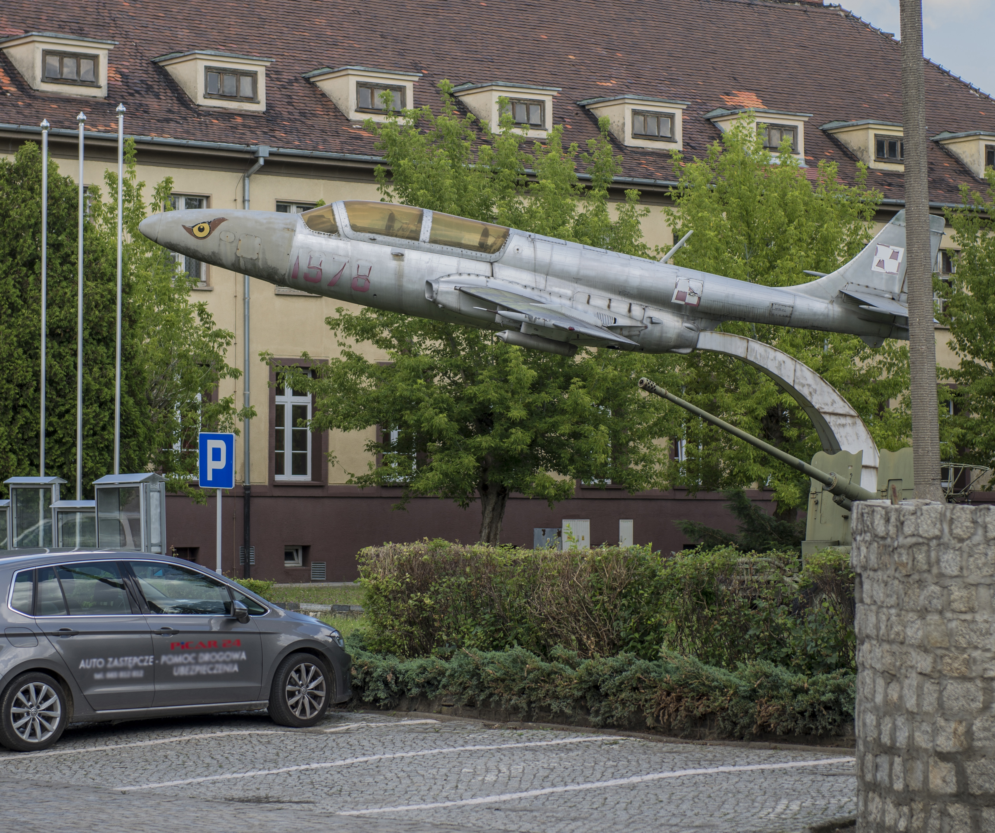 Pomnik TS-11 Iskra nr 1H-0504